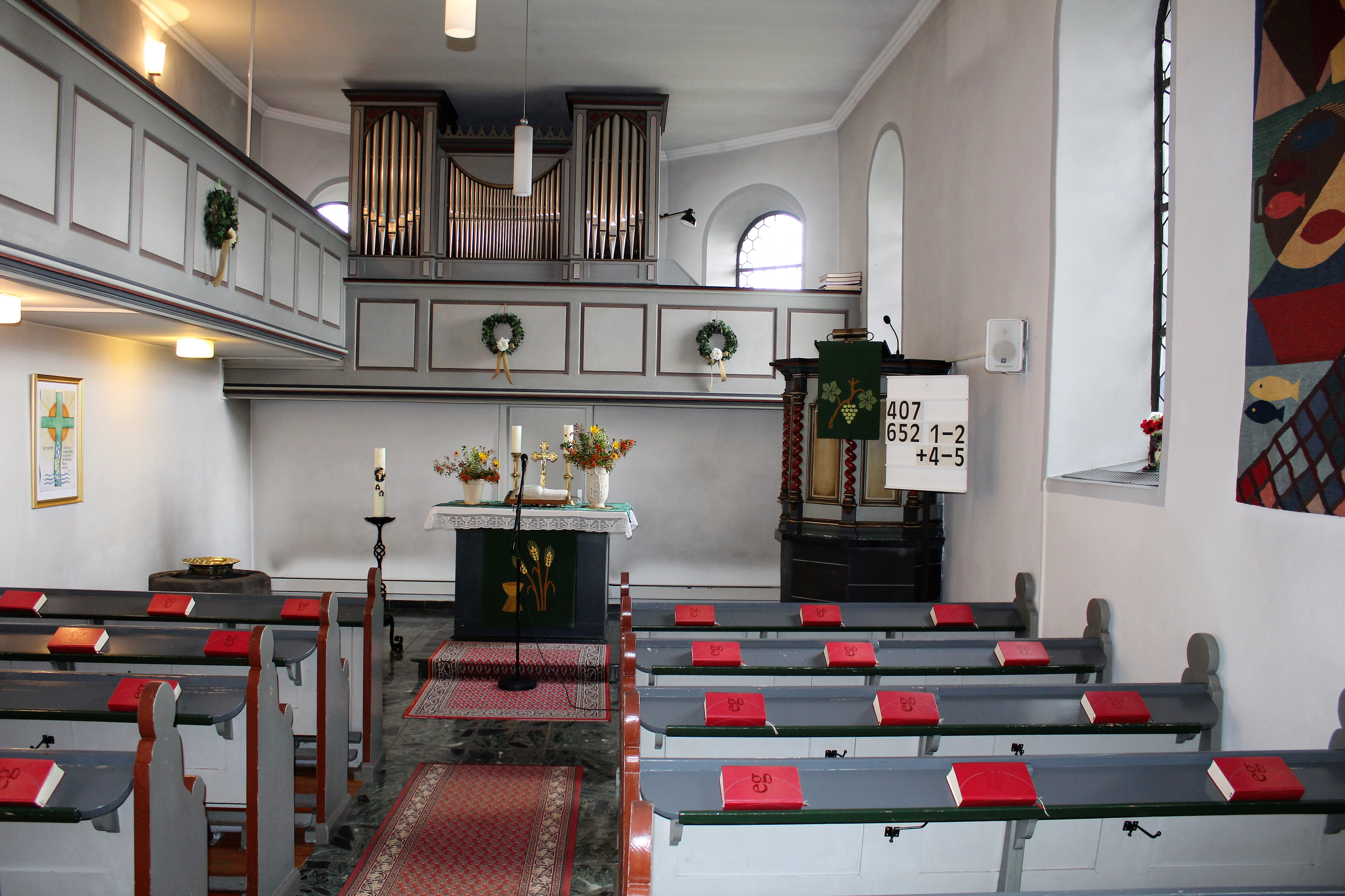 Evangelische Kirche Klein-Rechtenbach, Gemeinde Hüttenberg, Lahn-Dill-Kreis, Hessen, Deutschland